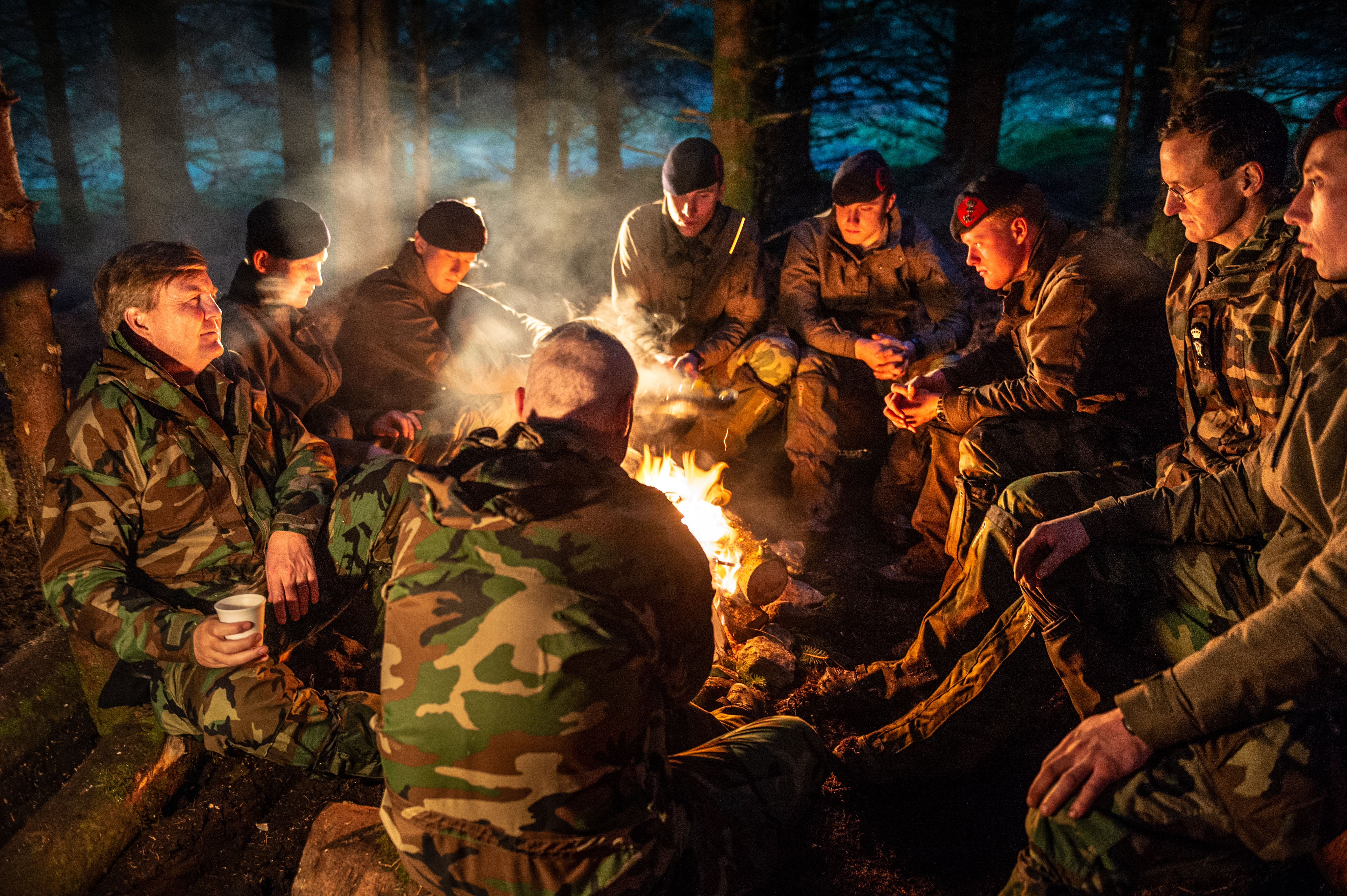 Garelochhead / 01-11-2018 - ZMK bezoekt Korps Mariniers tijdens de Bergtraining in Schotland